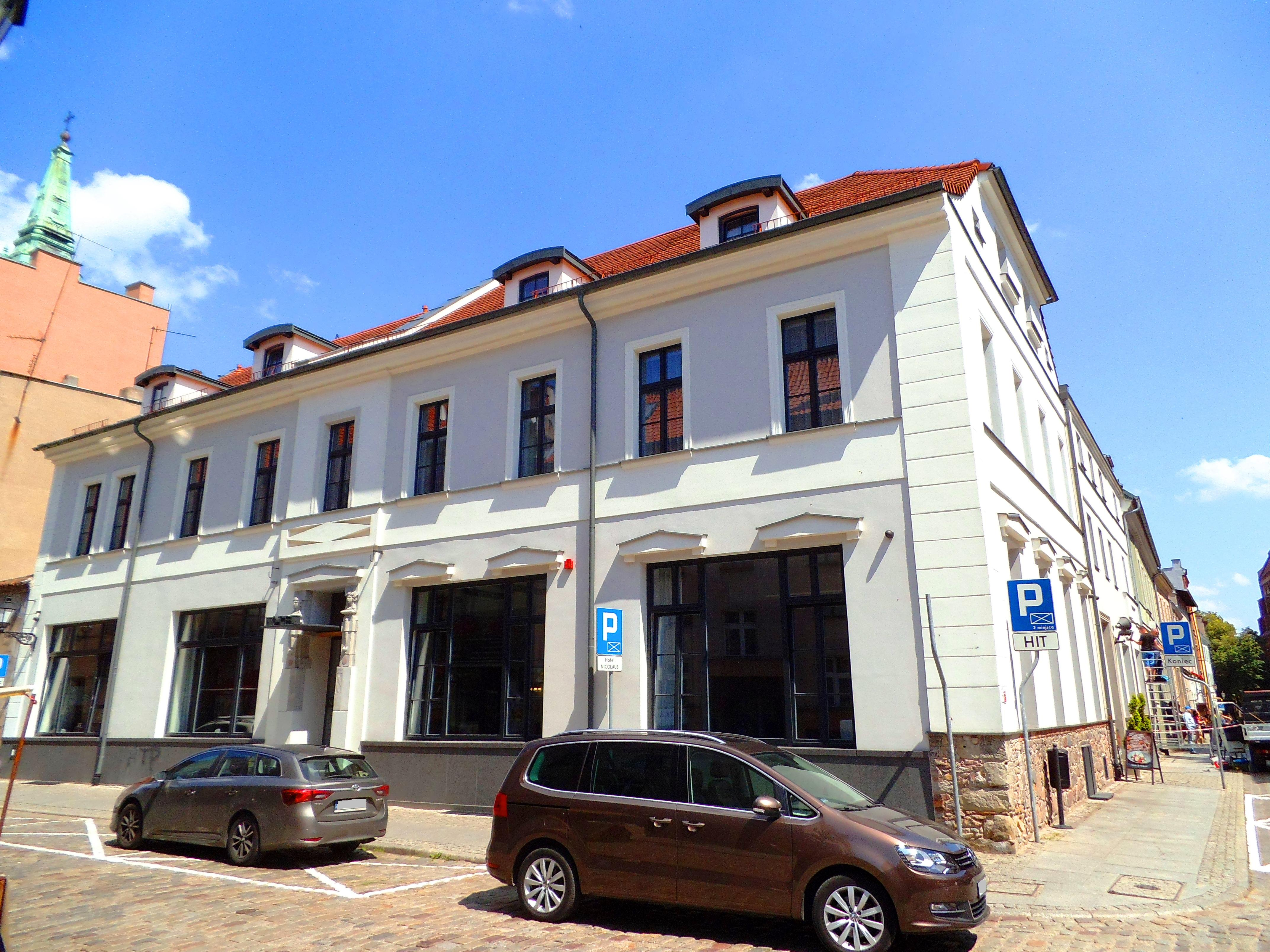 Hotel Nicolaus w Toruniu, lato2017